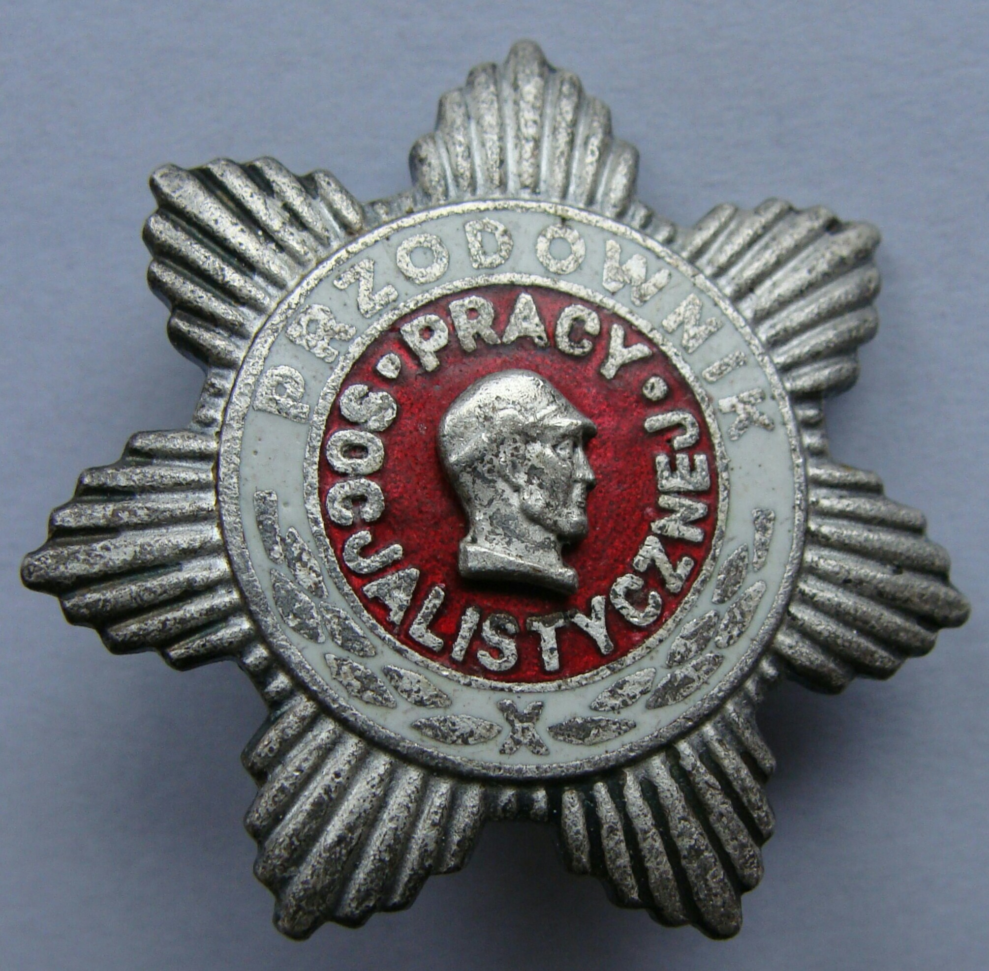 Przodownik pracy socjalistycznej